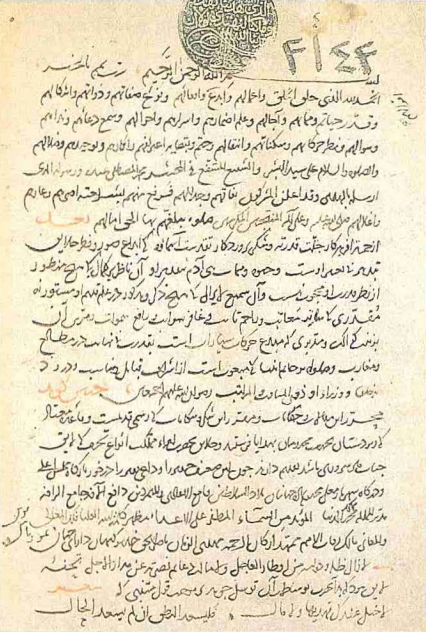 Kerimüddin Mahmud-i Aksarayî'nin Müsâmeretü'l-Ahbâr isimli eserinin orijinal el yazmasının ilk sayfası.